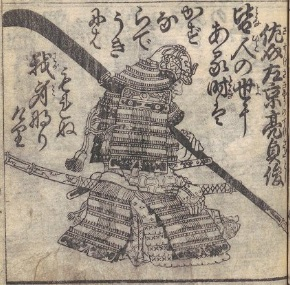 北条貞俊